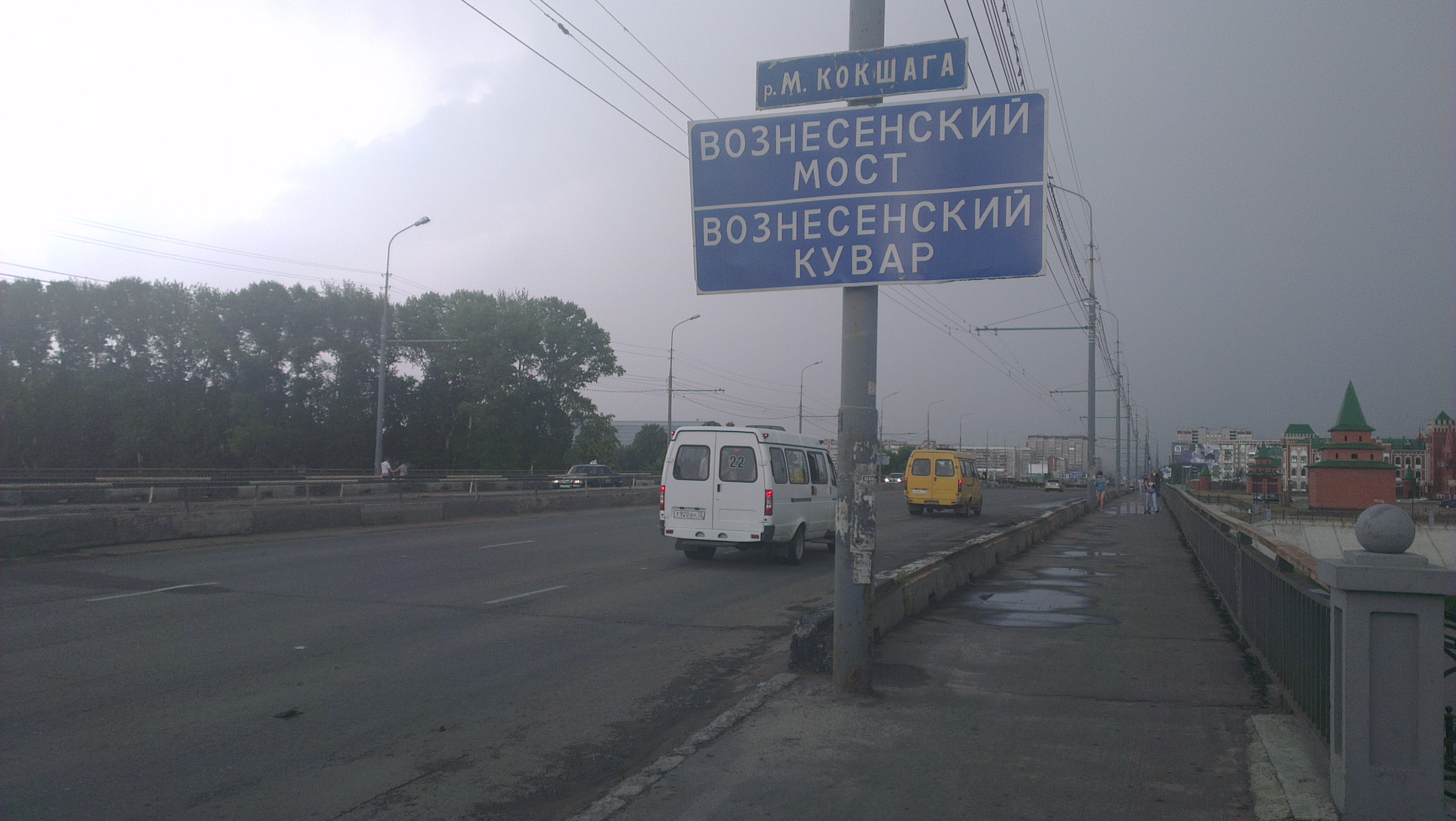 Вознесенский мост